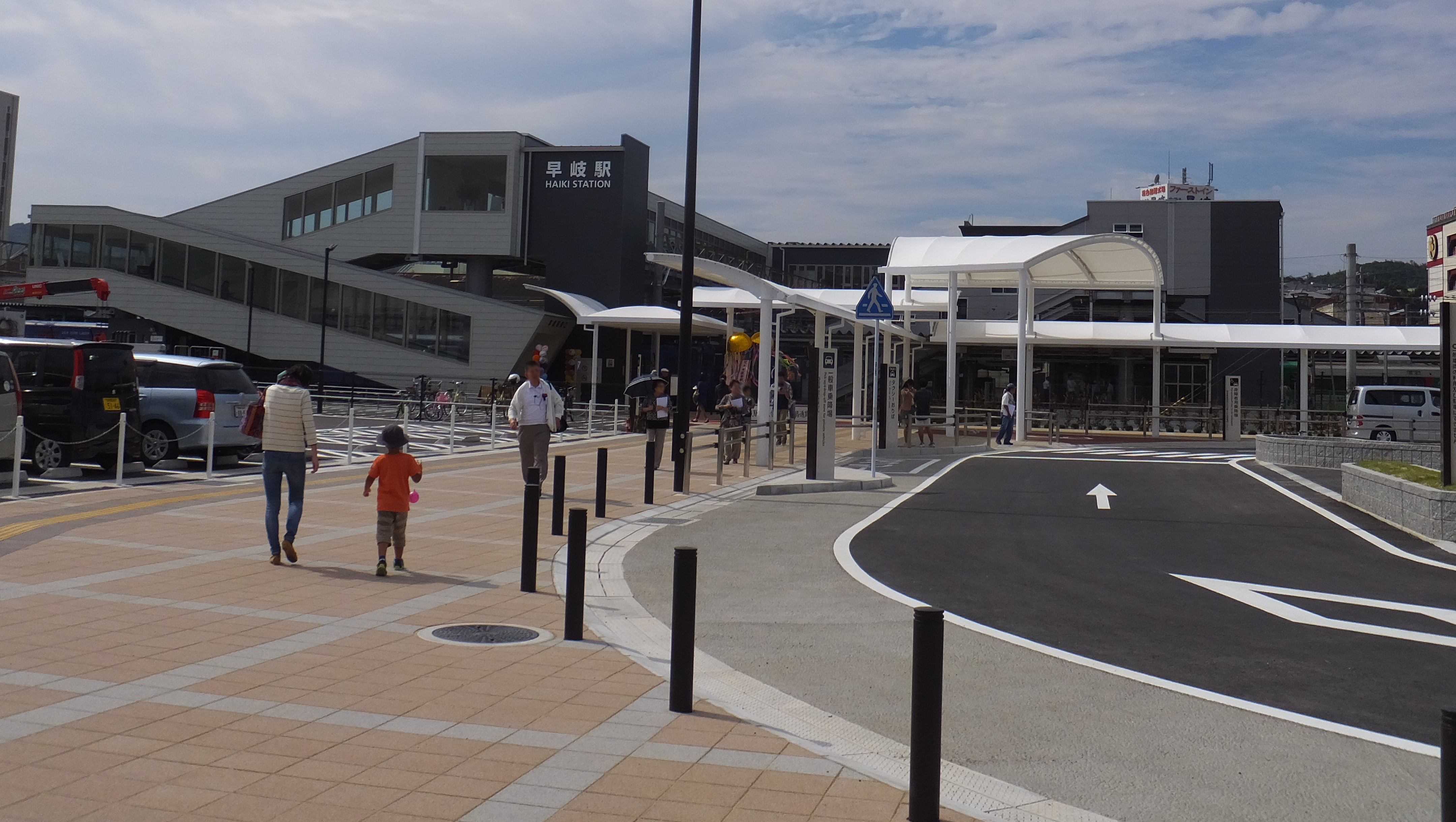 JR早岐駅東口